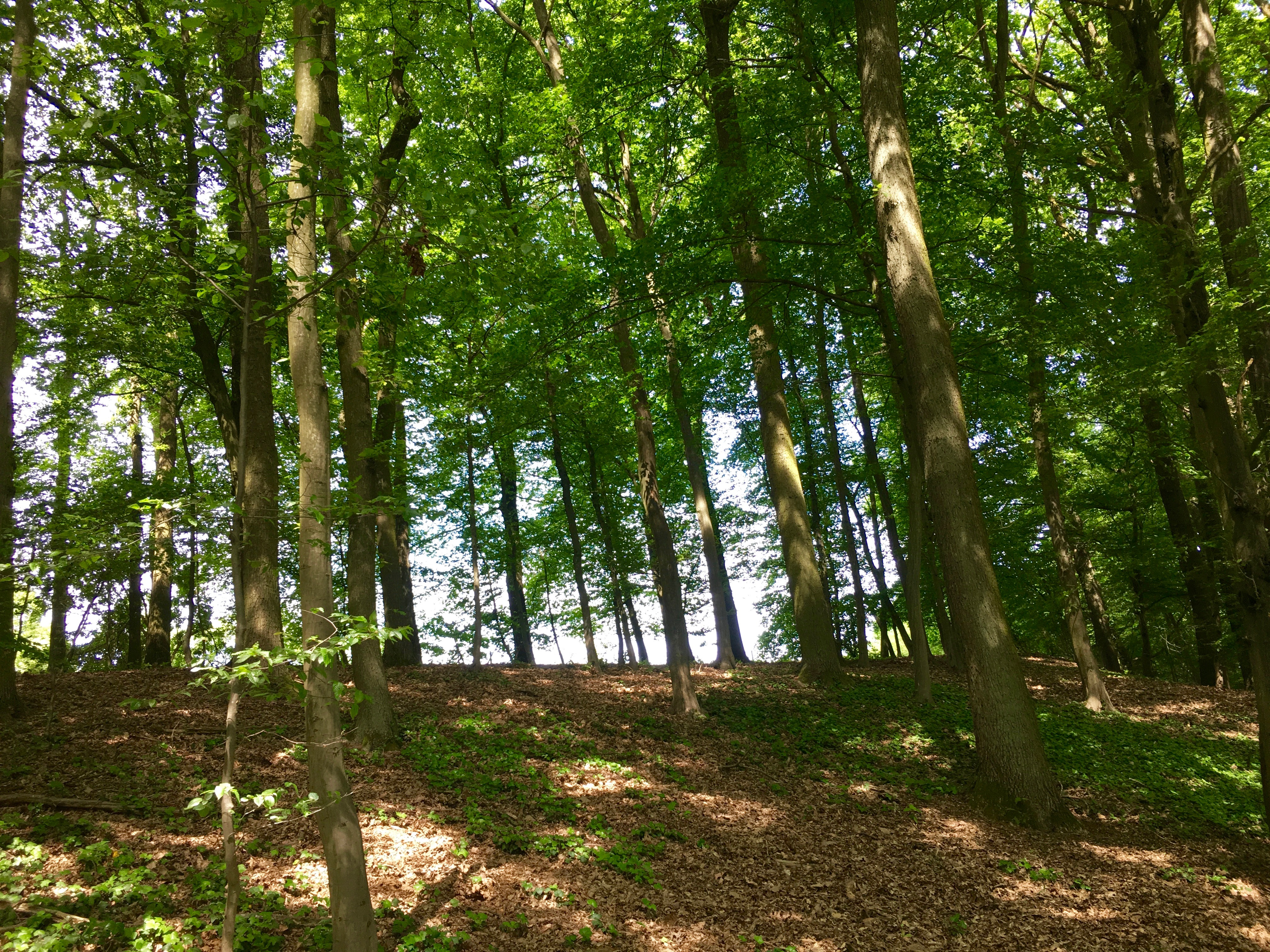 Hirschkäfervorkommen bei Kleinseebach 2